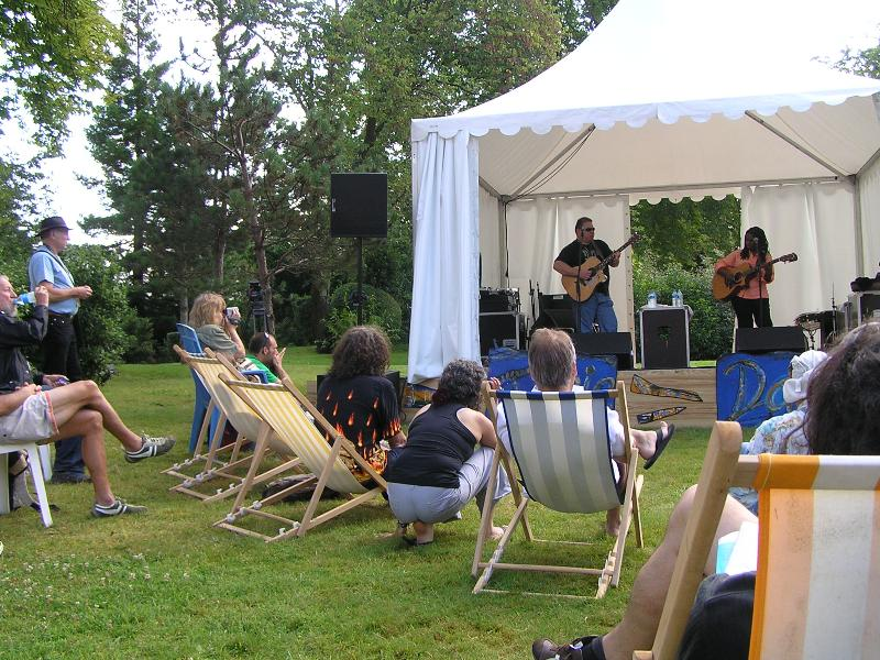 Blues passions 2007 Festival, Cognac, France. Ruthie Foster